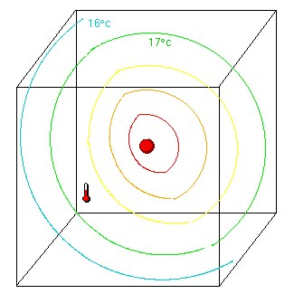 Illustration pour l'assimilation de données (Wikipedia France).